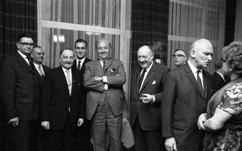 Empfang der LaVertr. Niedersachsen anl. Geburtstag von Frau Min. Maria Meyer-Sevenich (v.l.n.r.: 1. ?, 2. ?, 3. ?, 4. ?, 5. Bundesminister Prof. Dr. Carlo Schmid, 6. MdB Prof. Dr. v. Merkatz, 7. Staatssekretär Dr. Mannzen vom Nieders. Ministerium der Justiz, 8. MdB Ludwig Metzger, 9. Frau Minister Meyer-Sevenich)